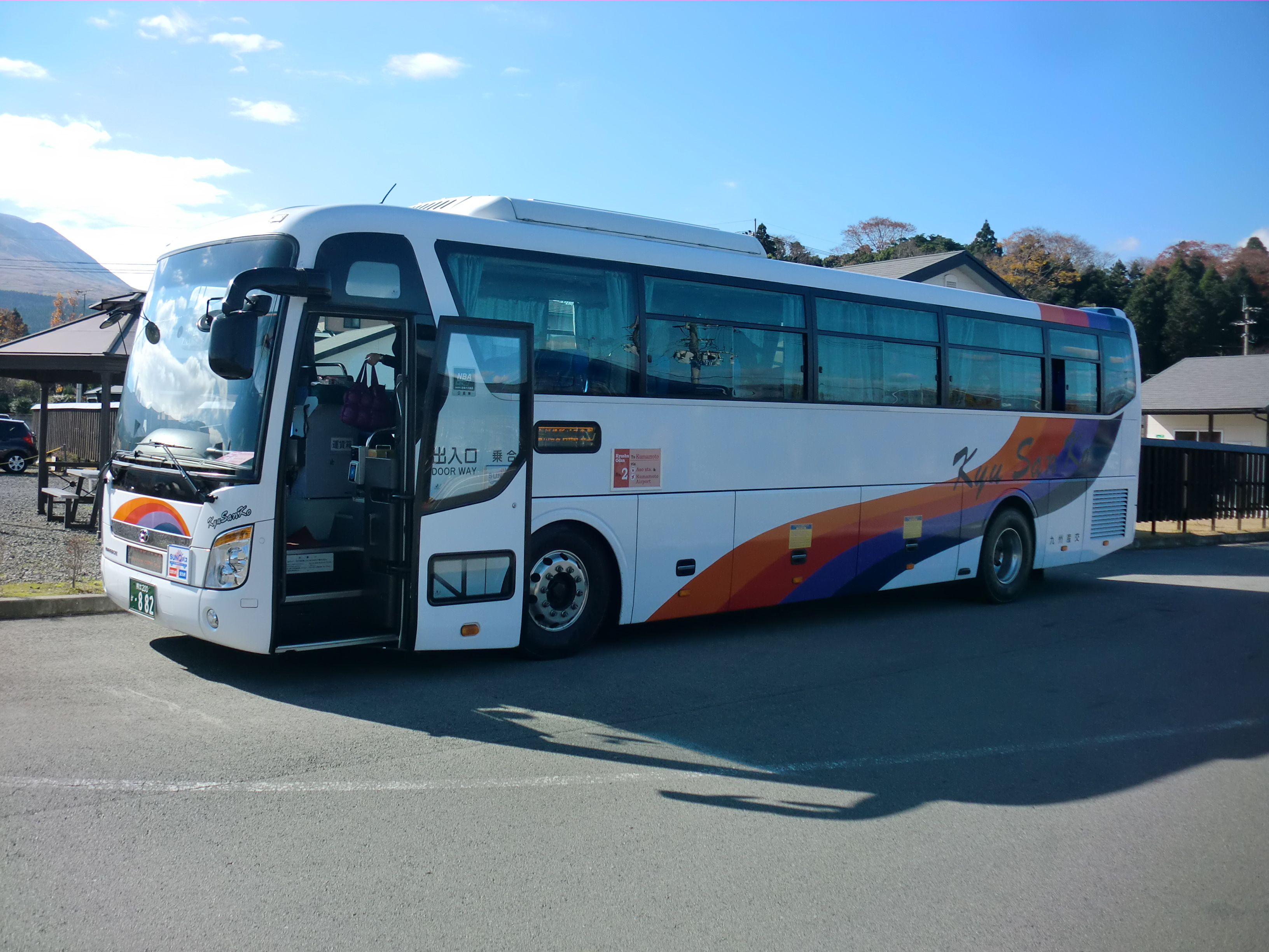 九州産交バス